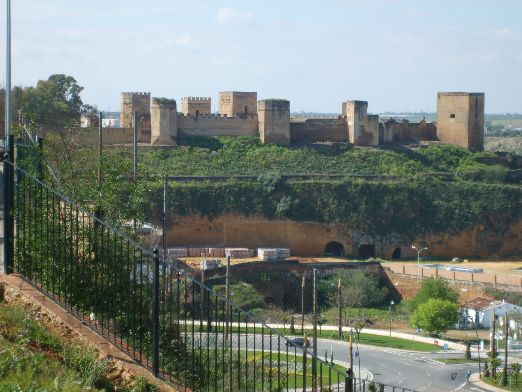 Castillo de Alcalá de Guadaíra